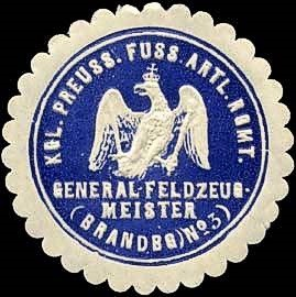 Sealing stamp Title: Königlich Preussisches Fuss Artillerie Regiment - General - Feldzeugmeister (Brandenburgisches) No. 3 Description: dunkelblau, weiß, geprägt Place: Mainz size: 4 cm